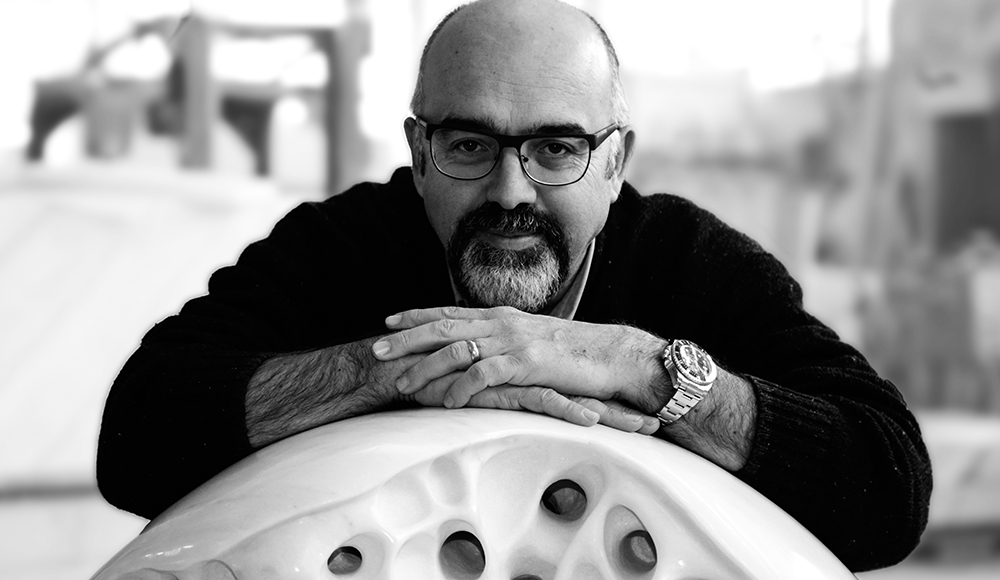 la foto ritrae lo scultore appoggiato ad una sua opera in marmo